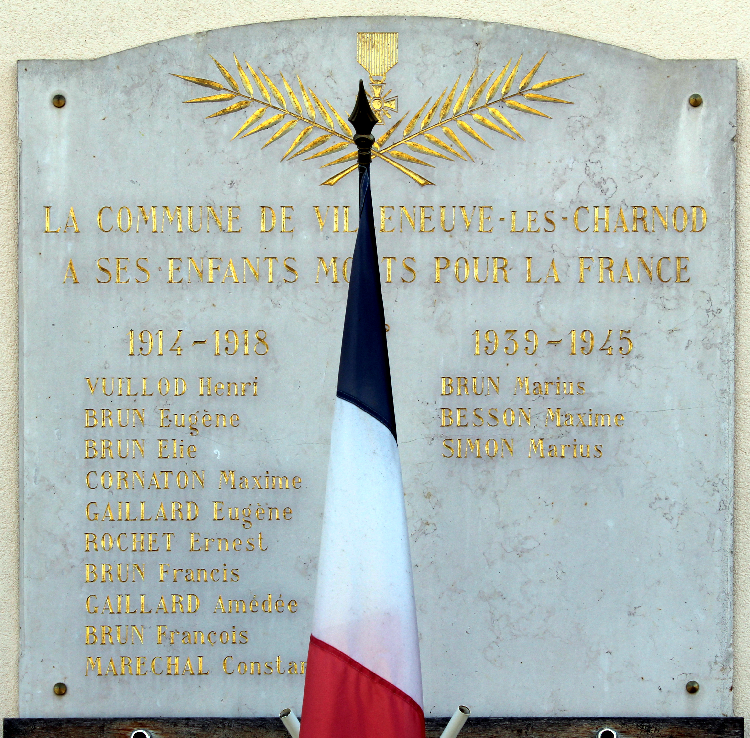 Plaque aux morts, mairie de Villeneuve-lès-Charnod, Aromas.